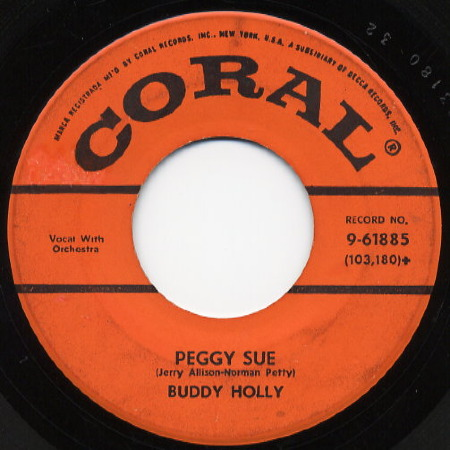 Foto del sencillo Peggy Sue de Buddy Holly.